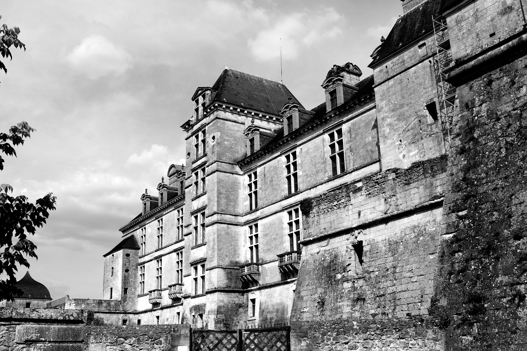 Château de Cadillac, France.